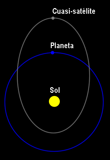 orbital diagram of a quasi-satellite